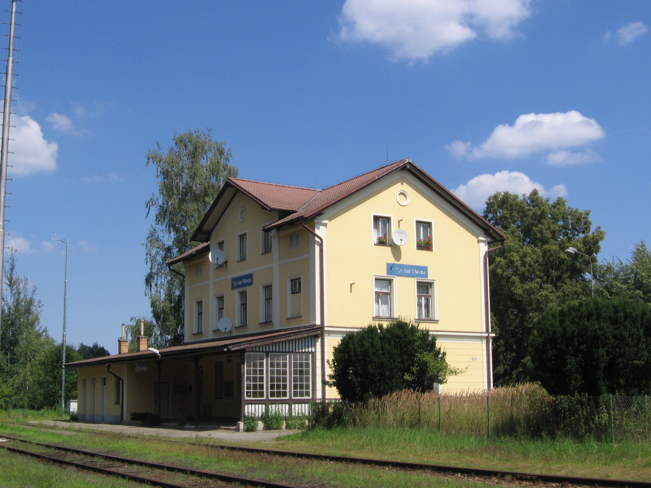 Nádraží v Týně nad Vltavou